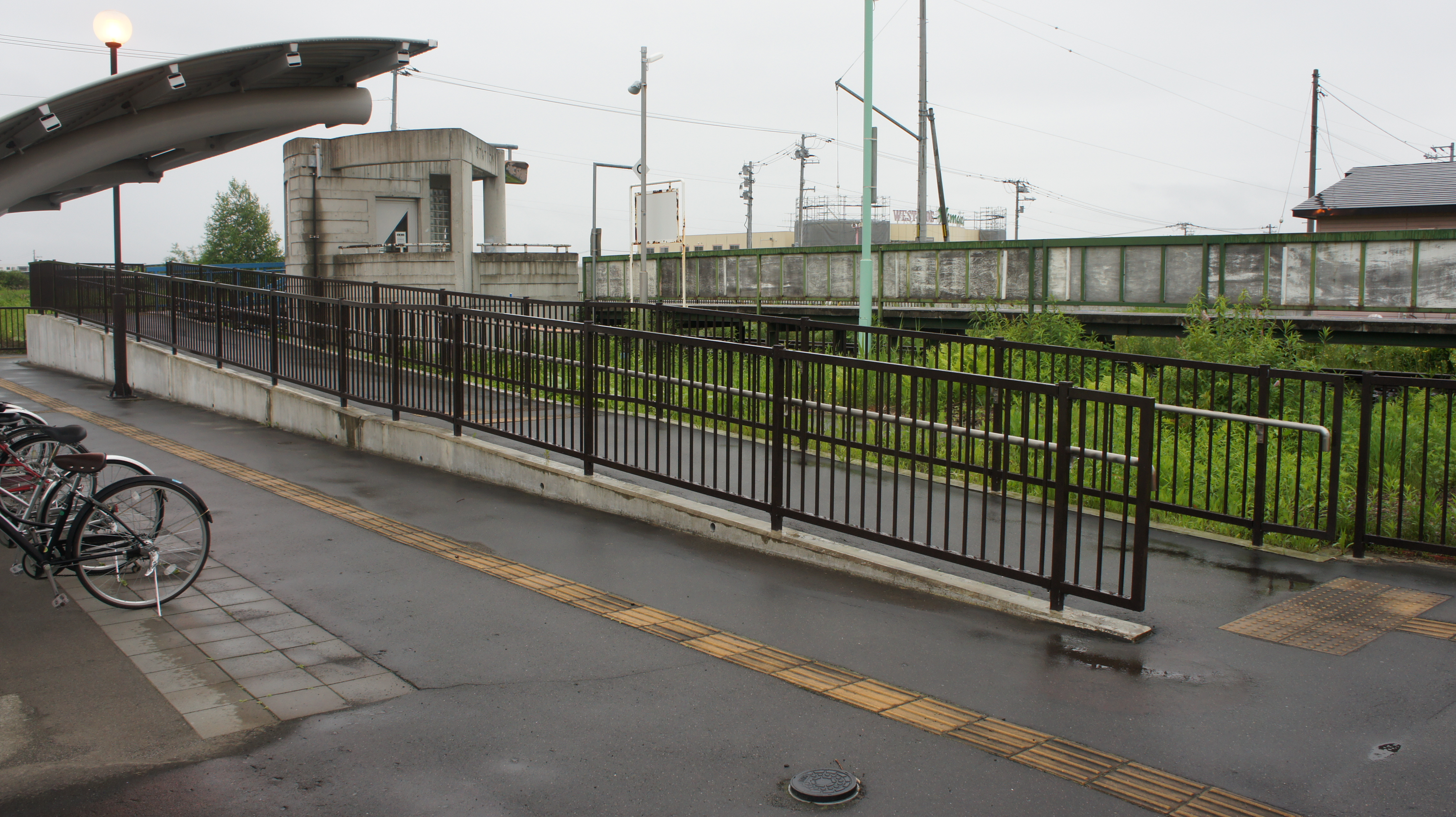 JR石北本線・西北見駅出入口